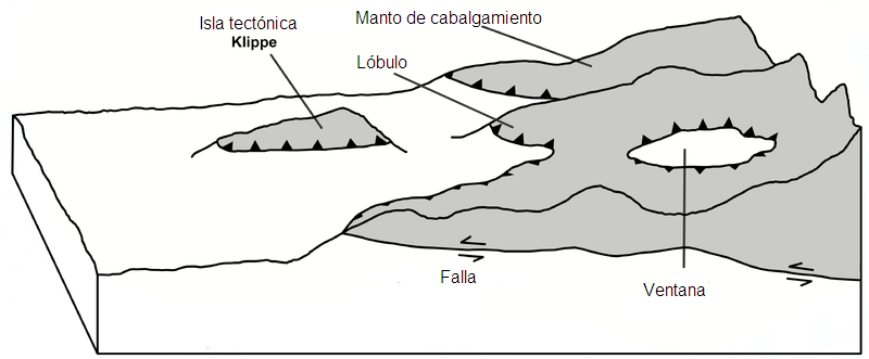 Bestandteile eines Überschiebungssystems: Klippe, Fenster, Decke, Überschiebung